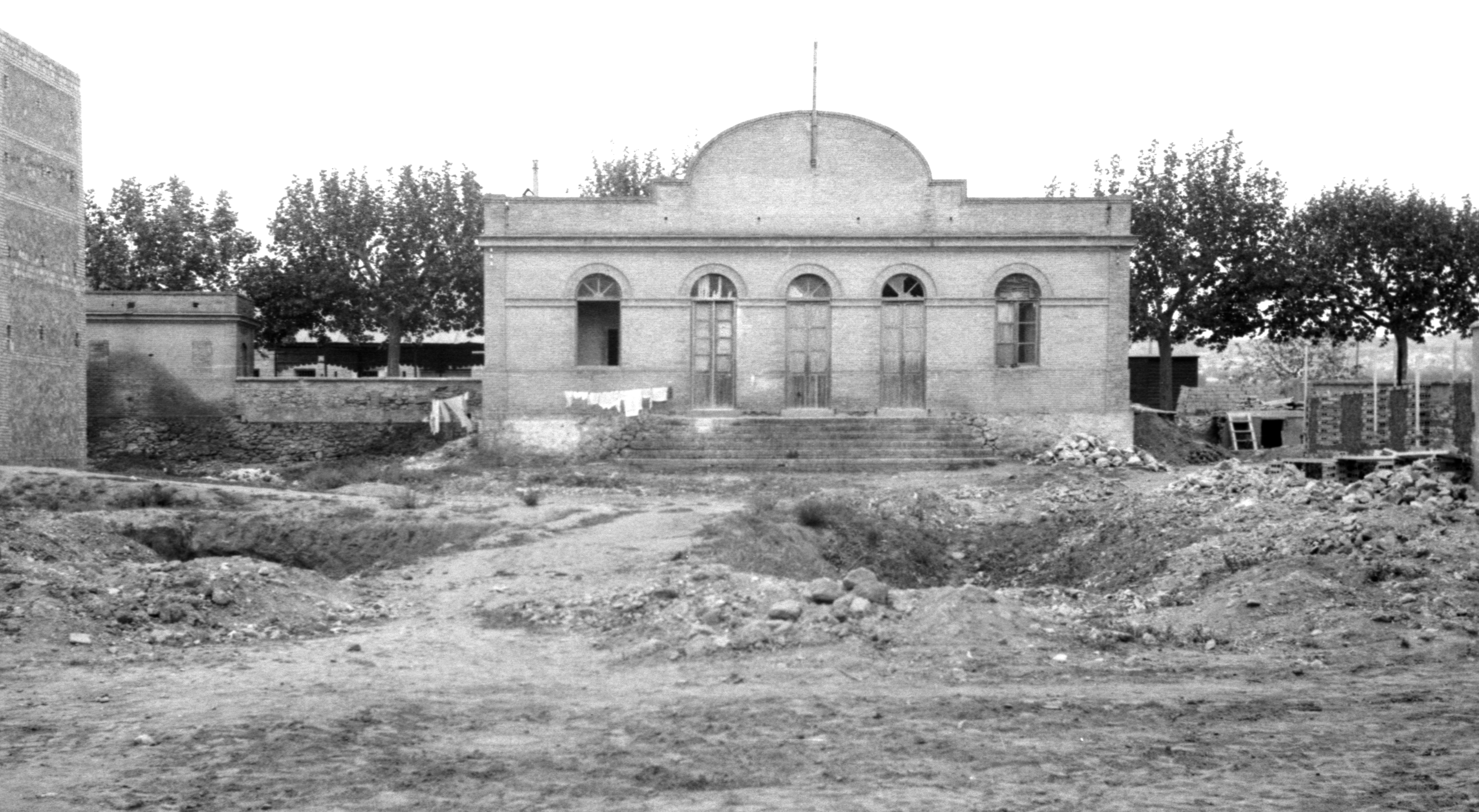 Fotografia d'Ismael Latorre Mendoza. Data: 24-11-1955. Aquesta fotografia s'hi troba publicada en: Fornés, Alberto; Císcar, José i Latorre, Ismael: Alginet, històries, costums i altres relats, Societat Cultural Alèdua, Alginet, 2003. Dipòsit Legal: V-2546-2003. Pàgina 201. BOSCH LÓPEZ, Rafael: L'urbanisme d'Alginet entre els segles XII-XX. Edita: Ajuntament d'Alginet; 2019. Dipòsit Legal V-1250-2019 ISBN 978-84-09-10894-7 Pàgina 259. D'aquest edifici s'hi pot veure una part a una fotografia (del 04-02-54) publicada en: Lozano, Josep i altres. Aljannat III. Monogràfic: Ismael Latorre Mendoza, any 2008. Edita: Ajuntament d'Alginet; ISSN 1886-984 X, p.21. Entrevista: conversant amb Ismael Latorre. Tractament digital: Carolina Latorre Canet